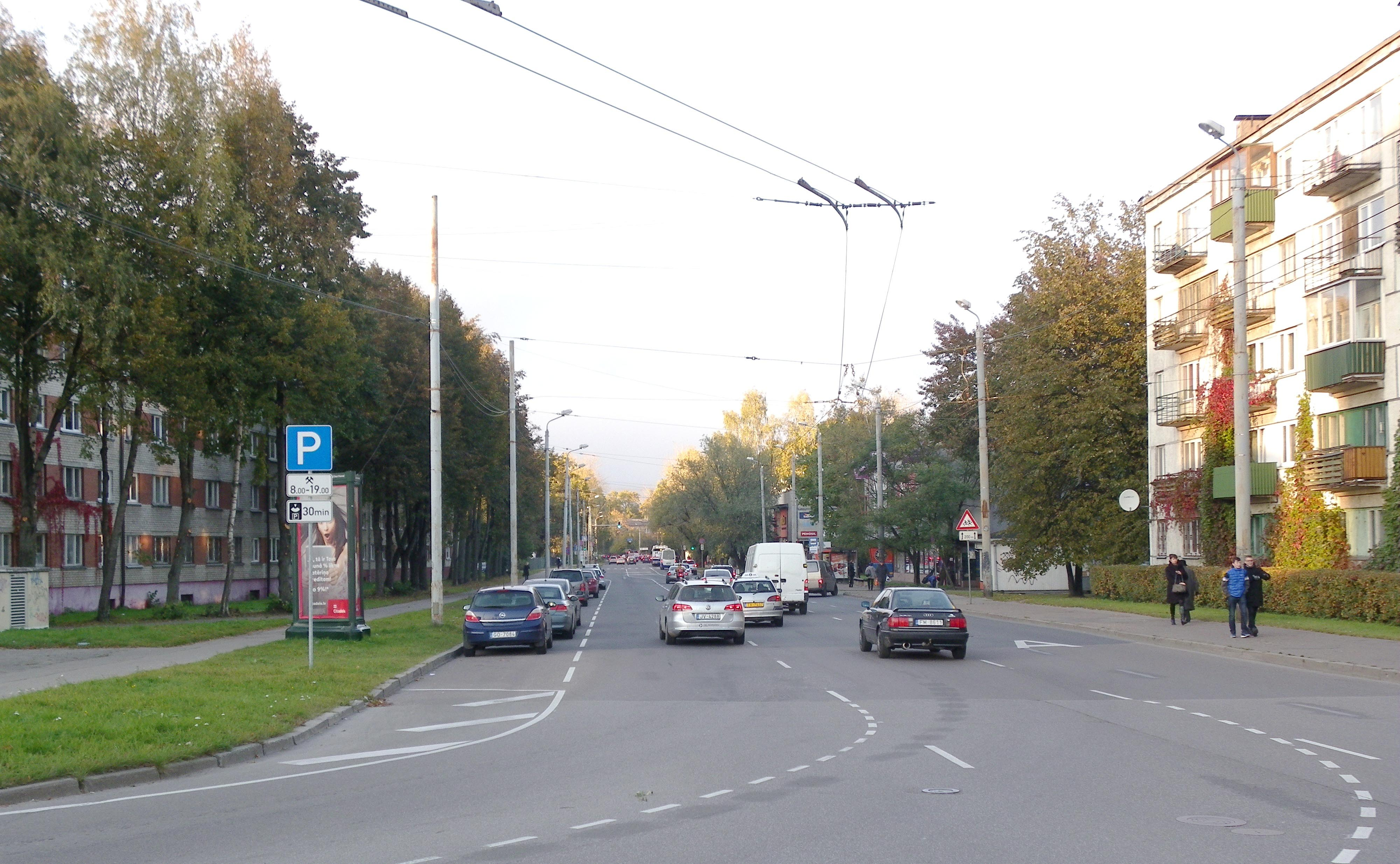 Vaidavas iela Rīgā